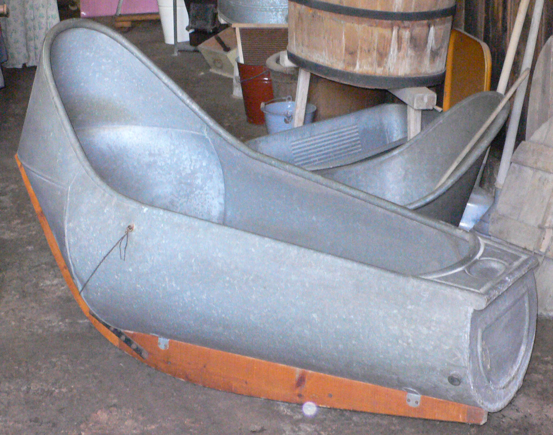 Schaukelbadewanne der Krausswerke, Schwarzenberg